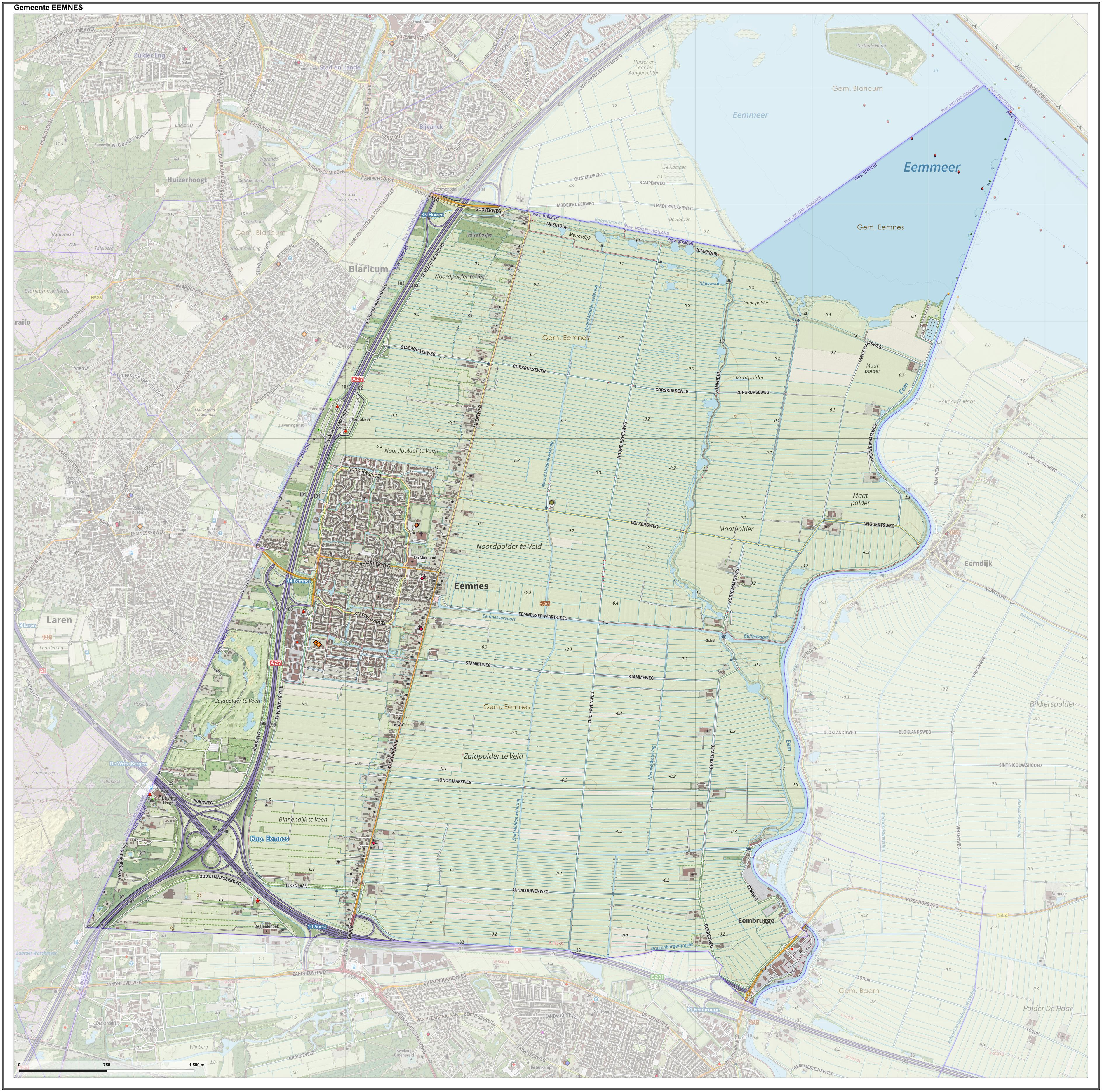 Topografische gemeentekaart. Resolutie: 400 pixels/km. Kaartbeeld samengesteld uit de open geodata van de Top10NL en Top25namen (Kadaster), Creative Commons-BY licentie. Gebouwvlakken uit open geodata BAG extract. Wegen uit de OpenStreetMap, OpenStreetMap community. Reliëfschaduw uit de Actuele Hoogtekaart AHN2. Samenstelling en kleurenschema: Jan-Willem van Aalst, met QGIS. Zie ook de Legenda.